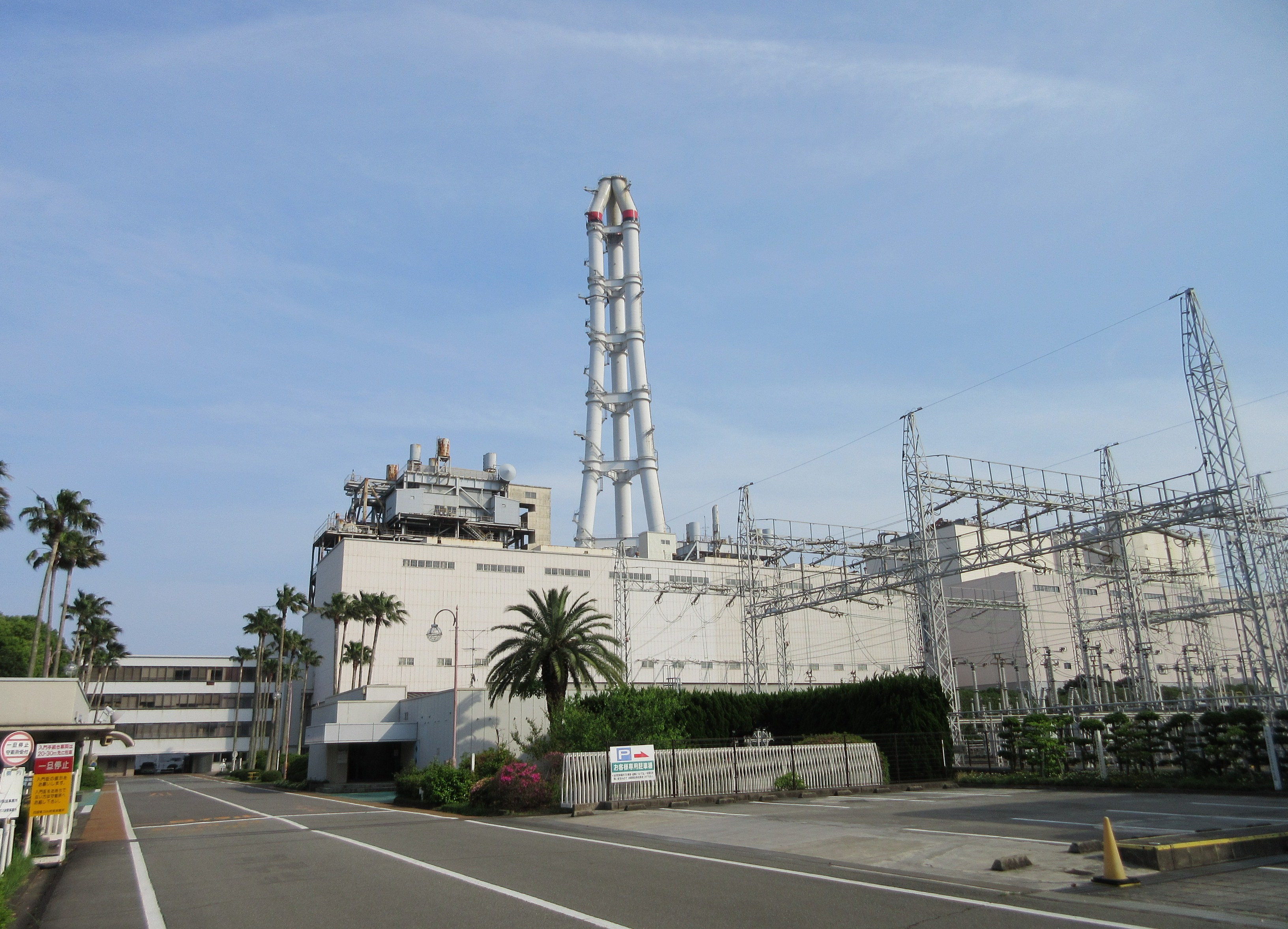 四国電力阿南発電所